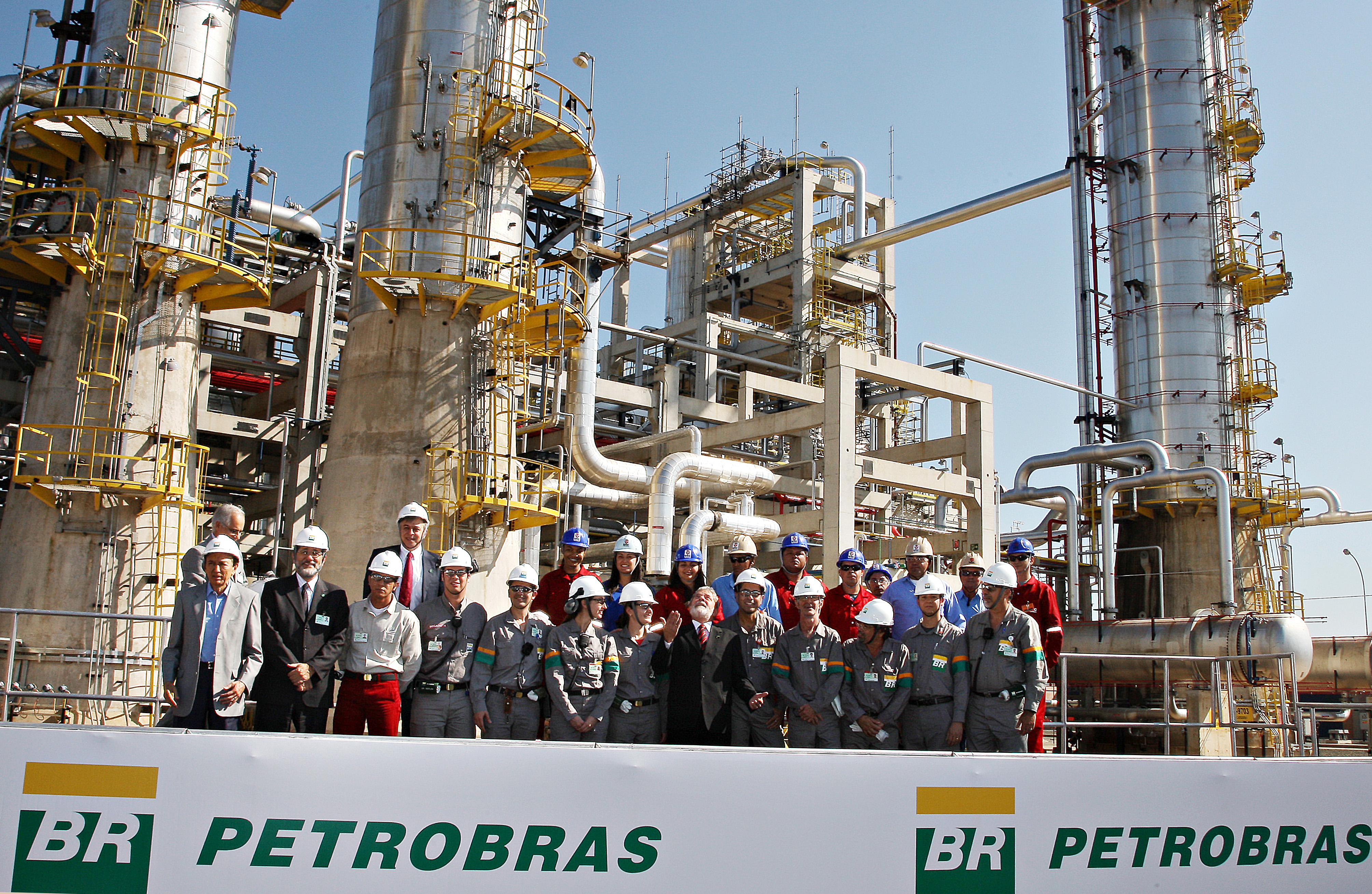 Presidente Lula posa para foto com funcionários da Petrobras na Unidade de Propeno da Refinaria do Replan, em Paulínia.